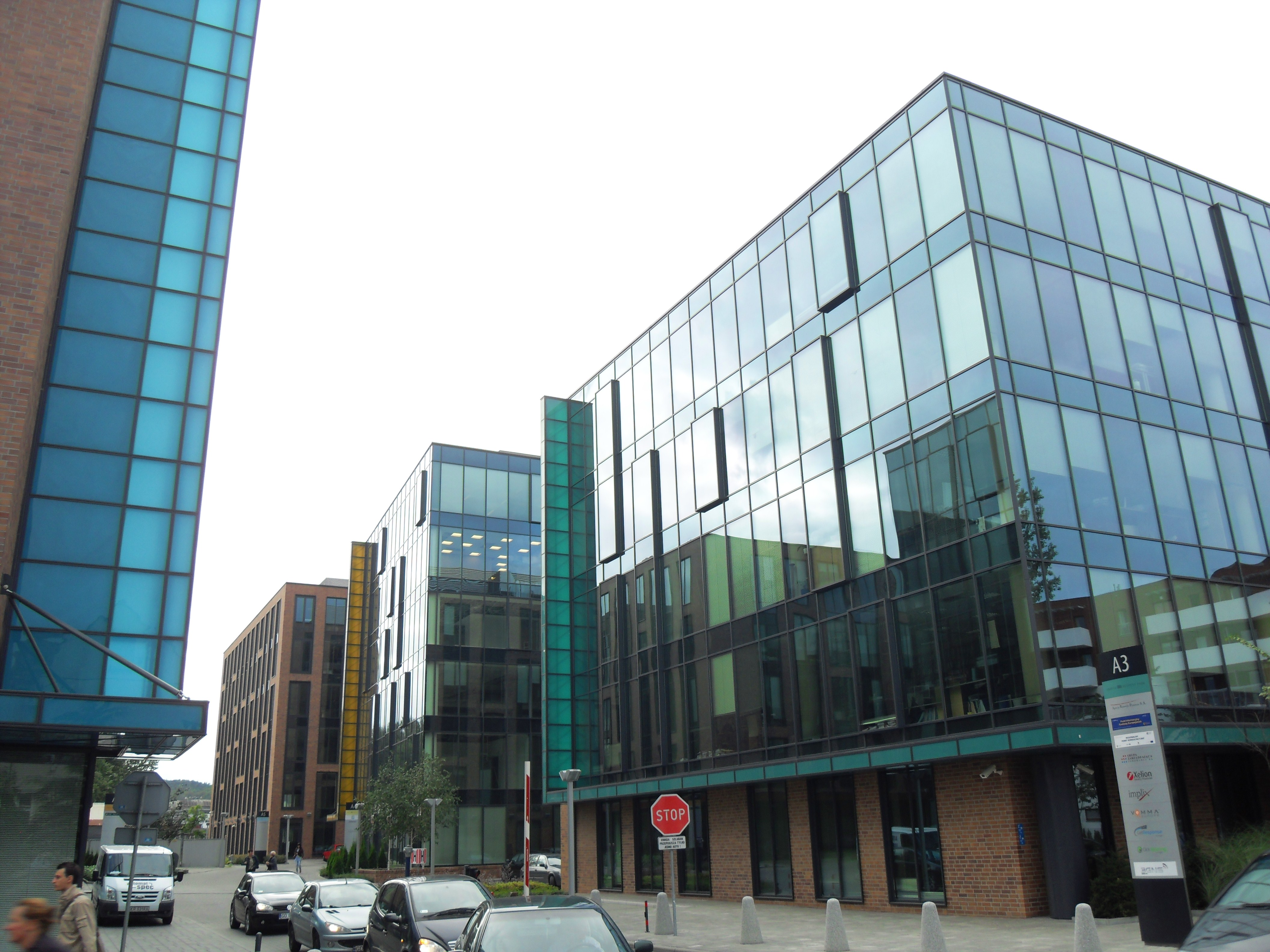 Gdańsk Przymorze. "Arkońska Business Park", budynki A3, A4 i A5.